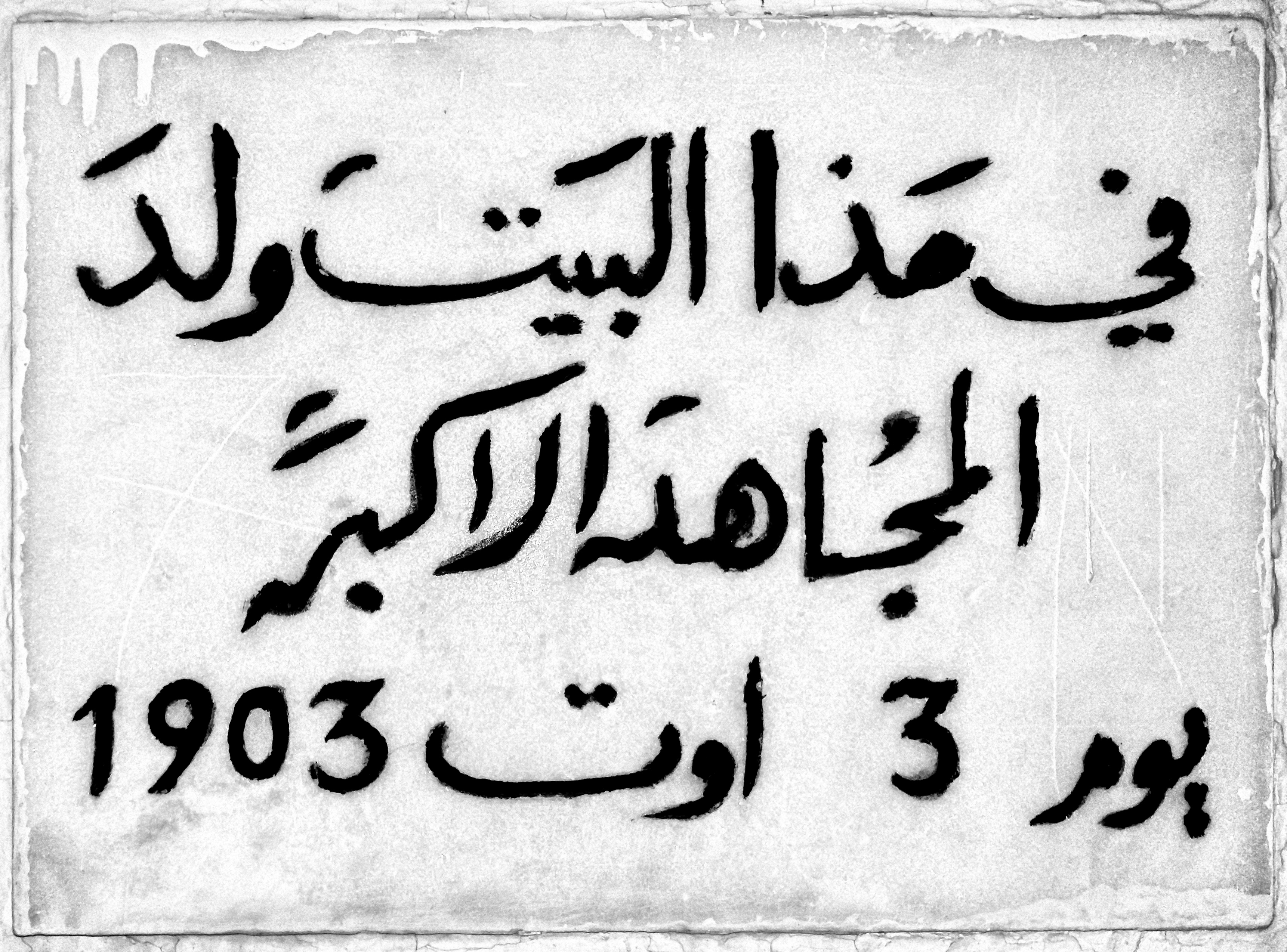 Immeuble sis boulevard Habib-Bourguiba (maison natale du président Habib Bourguiba)